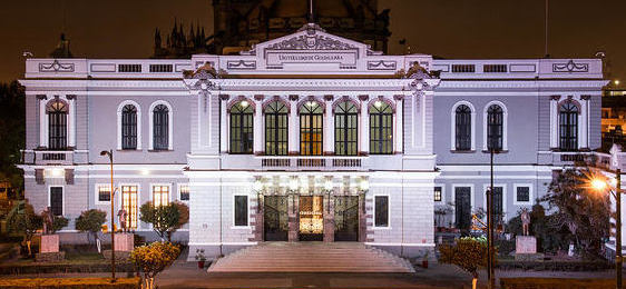 Fotografía de la fachada del MUSA.